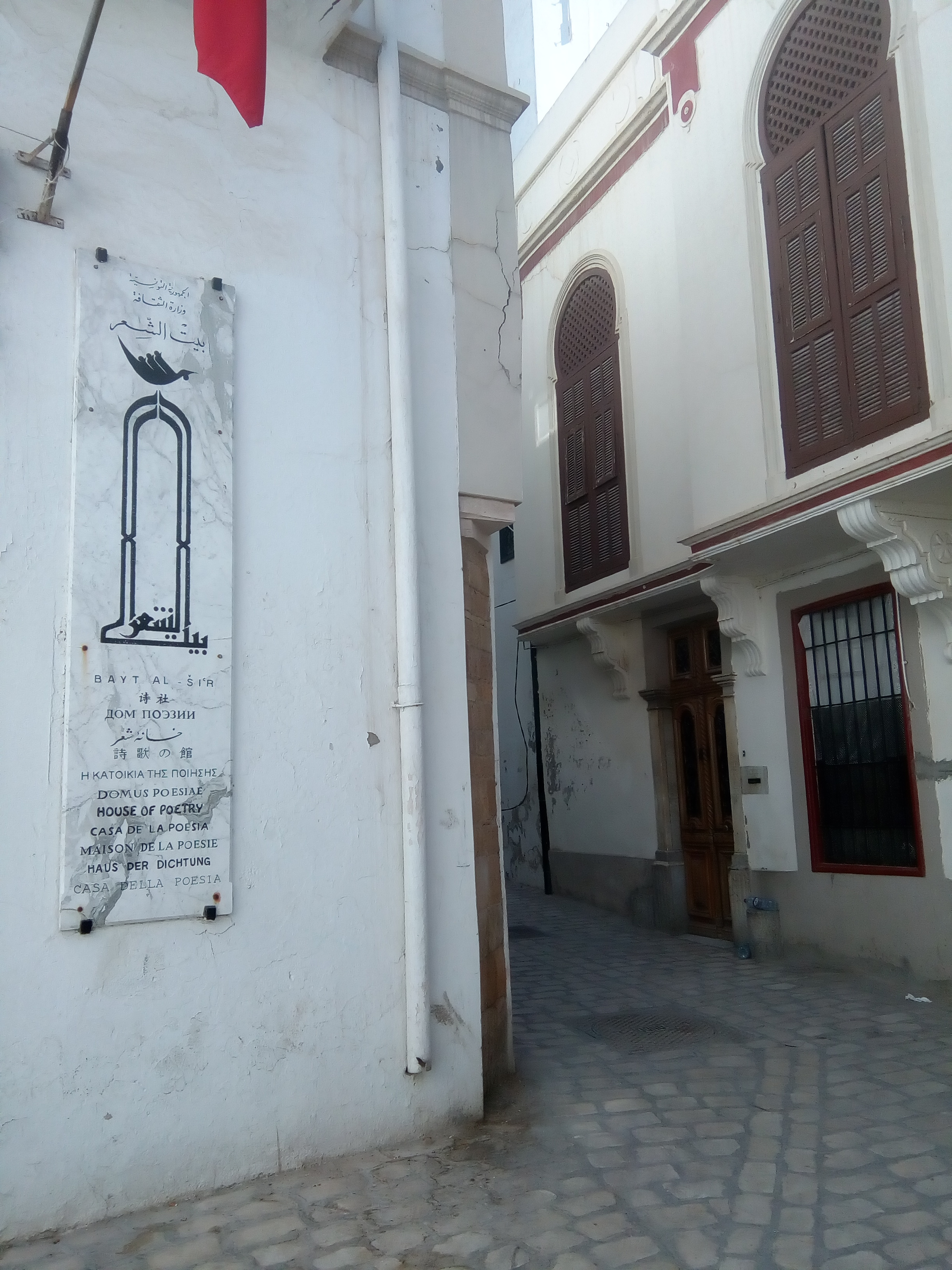 Rue du Tribunal dans la médina de Tunis